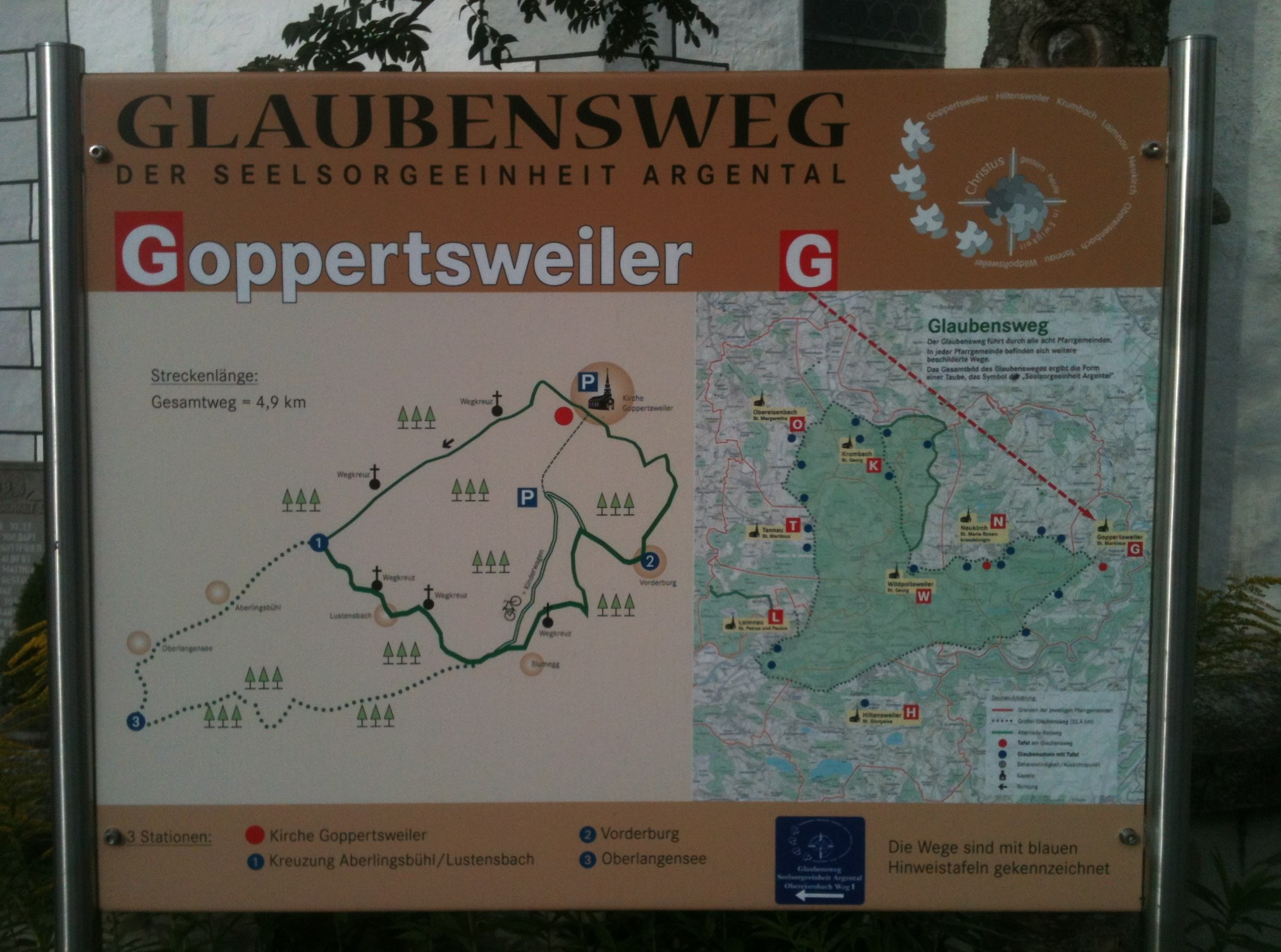 Deutschland - Baden-Württemberg - Bodenseekreis - Neukirch - Goppertsweiler: Infotafel "Glaubensweg" der Seelsorgeeinheit Argental